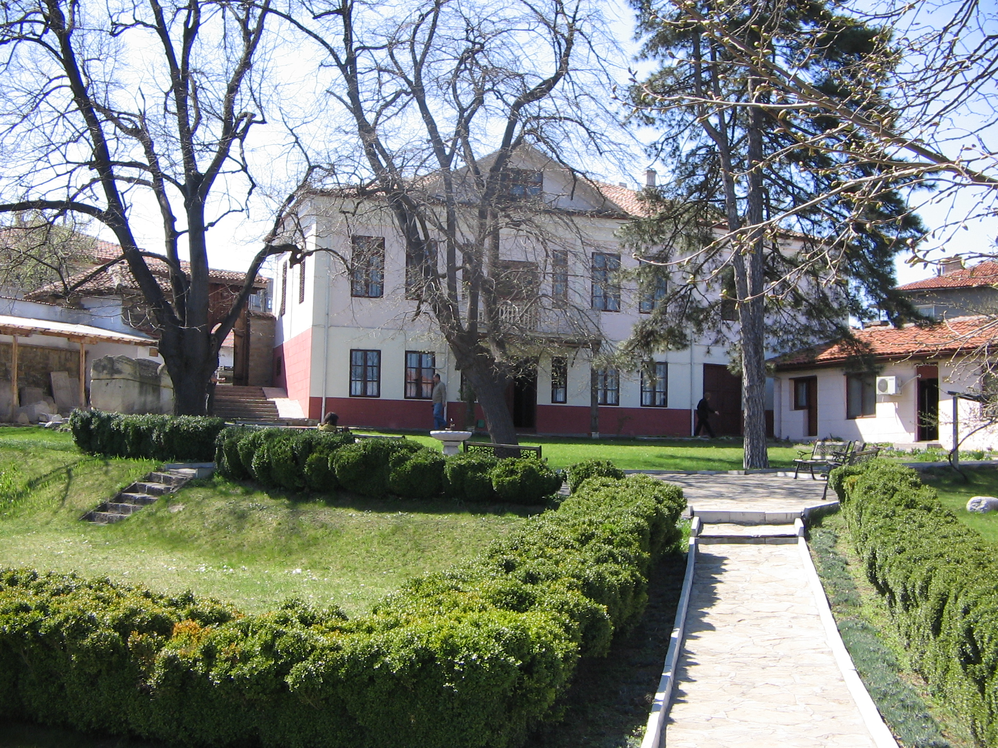 Къща-музей Алеко Константинов в град Свищов